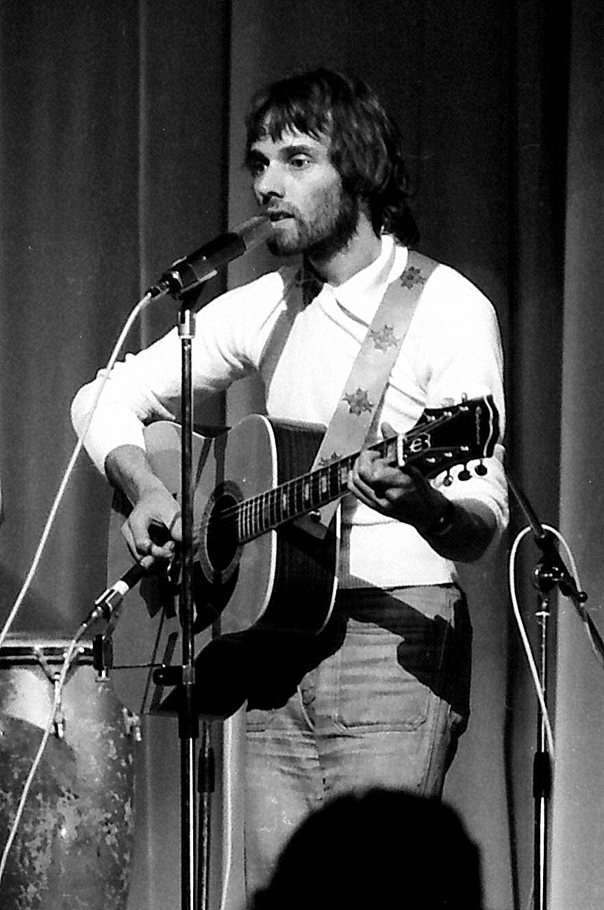 Palais des Congrès, septembre 1974, soirée de soutien au Chili